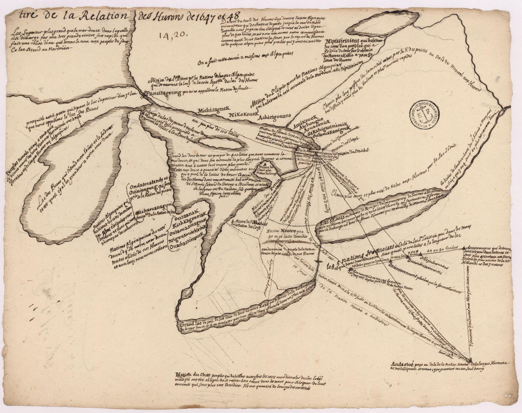 Carte de la région des Grands Lacs, par Guillaume Delisle, "Tiré de la relation des Hurons de 1647 et 48".